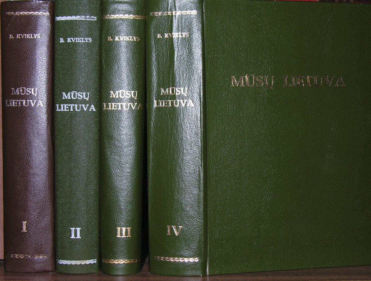 Enciklopedinis žinynas „Mūsų Lietuva". 2-oji (fotografuotinė) laida. Vilnius, 1989 - 1991., t. 1-4. Foto: Algirdas, 2006 m. gegužės 4 d/